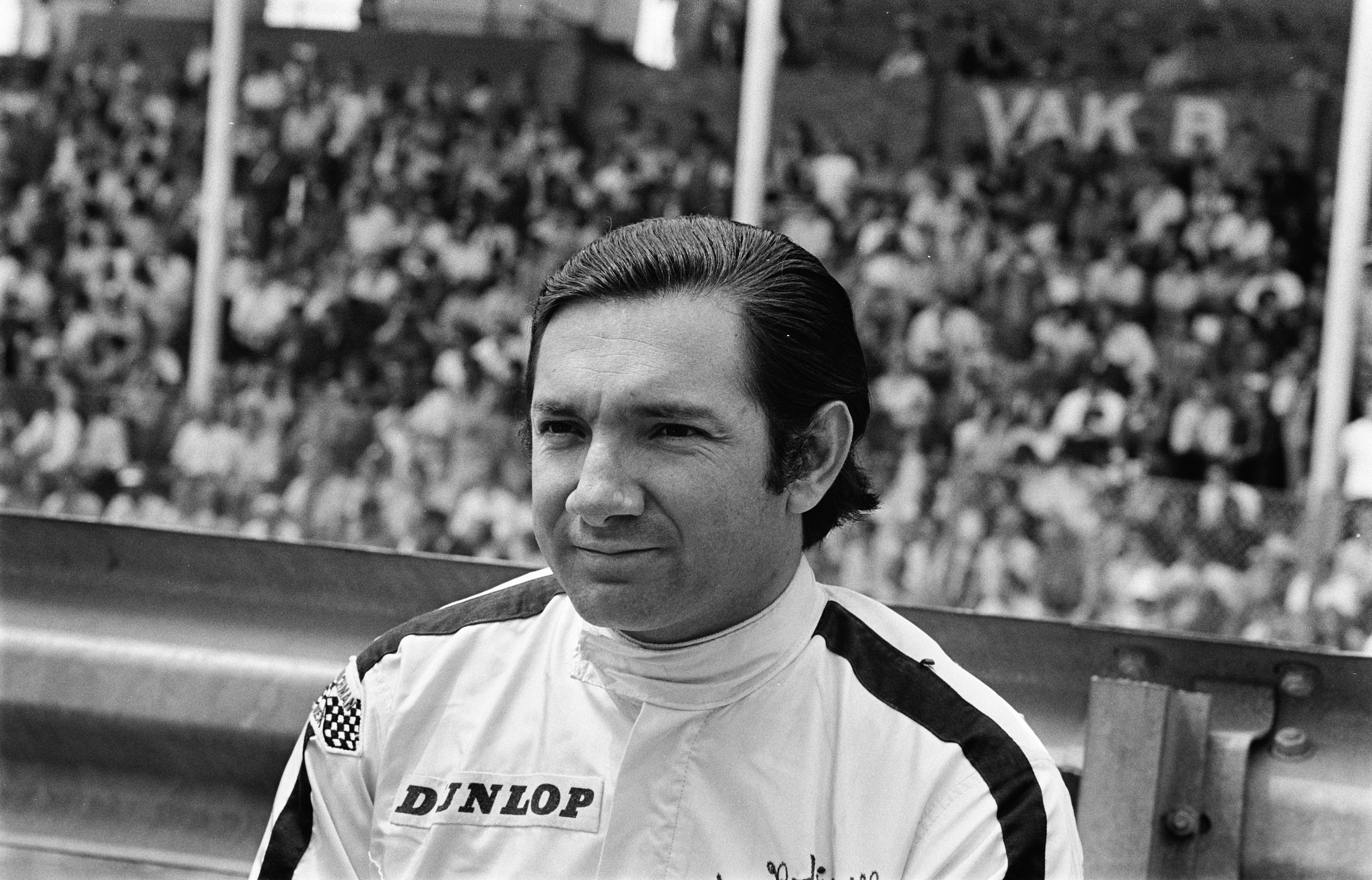 Collectie / Archief : Fotocollectie Anefo Reportage / Serie : Grand Prix Zandvoort 1970 Beschrijving : Grand Prix 1970 van Nederland voor Formule I wagens , Zandvoort; Pedro Rodríguez Datum : 21 juni 1970 Locatie : Noord-Holland, Zandvoort Trefwoorden : autosport, portretten Persoonsnaam : Rodriguez, Pedro Fotograaf : Evers, Joost / Anefo Auteursrechthebbende : Nationaal Archief Materiaalsoort : Negatief (zwart/wit) Nummer archiefinventaris : bekijk toegang 2.24.01.05 Bestanddeelnummer : 923-6112